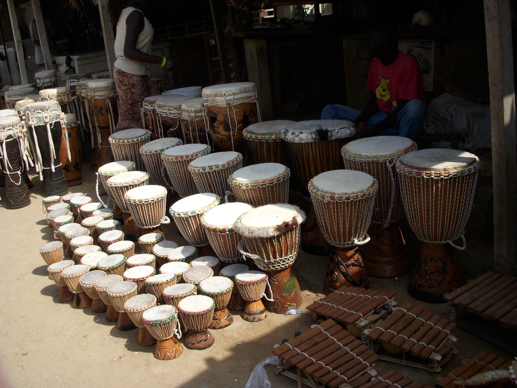 Vendeur de djembés et autres instruments traditionnels à Dakar, Sénégal